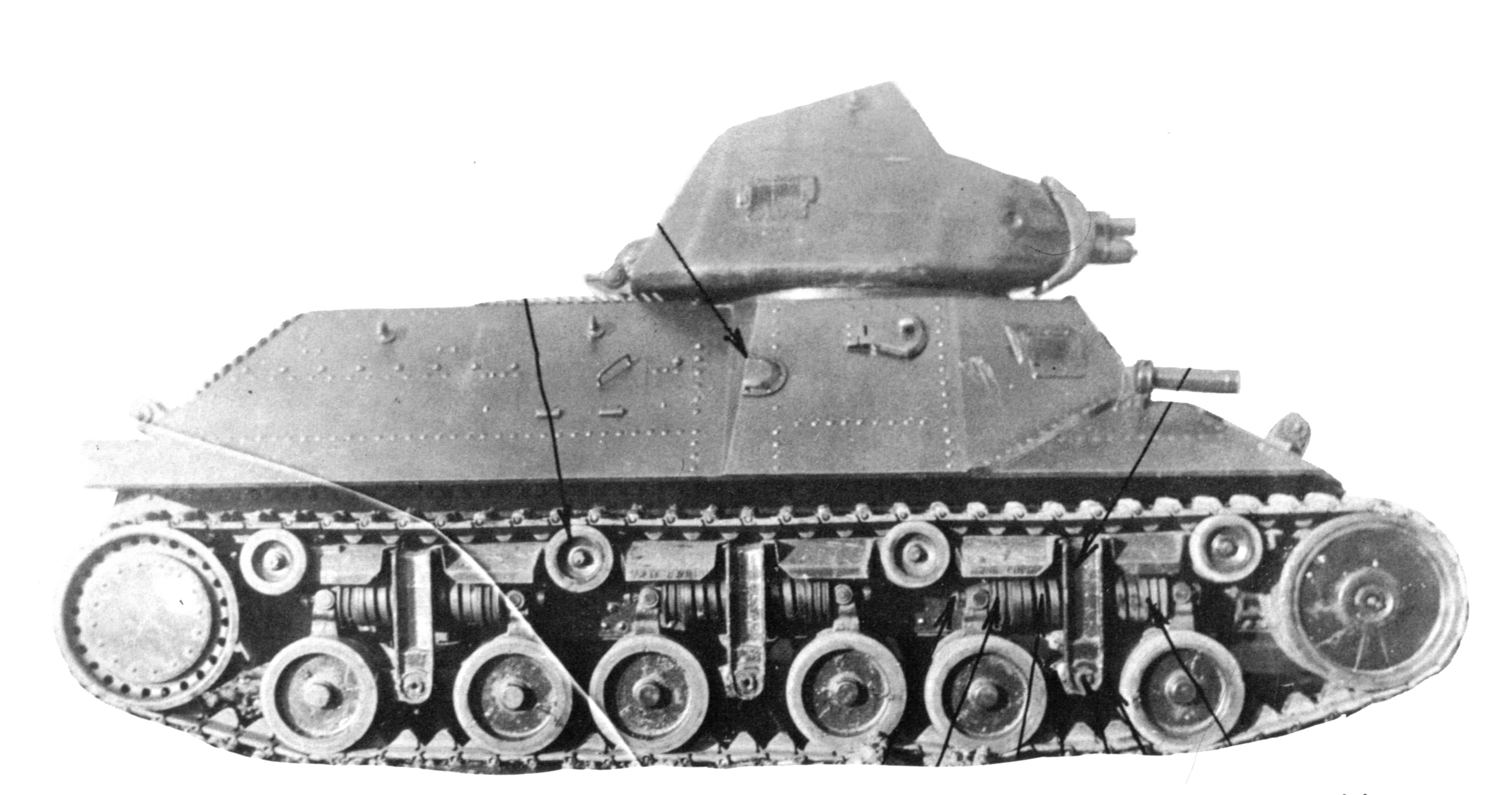 Digitale reproductie foto van het verbeterde prototype van de Char Batignolles-Châtillon